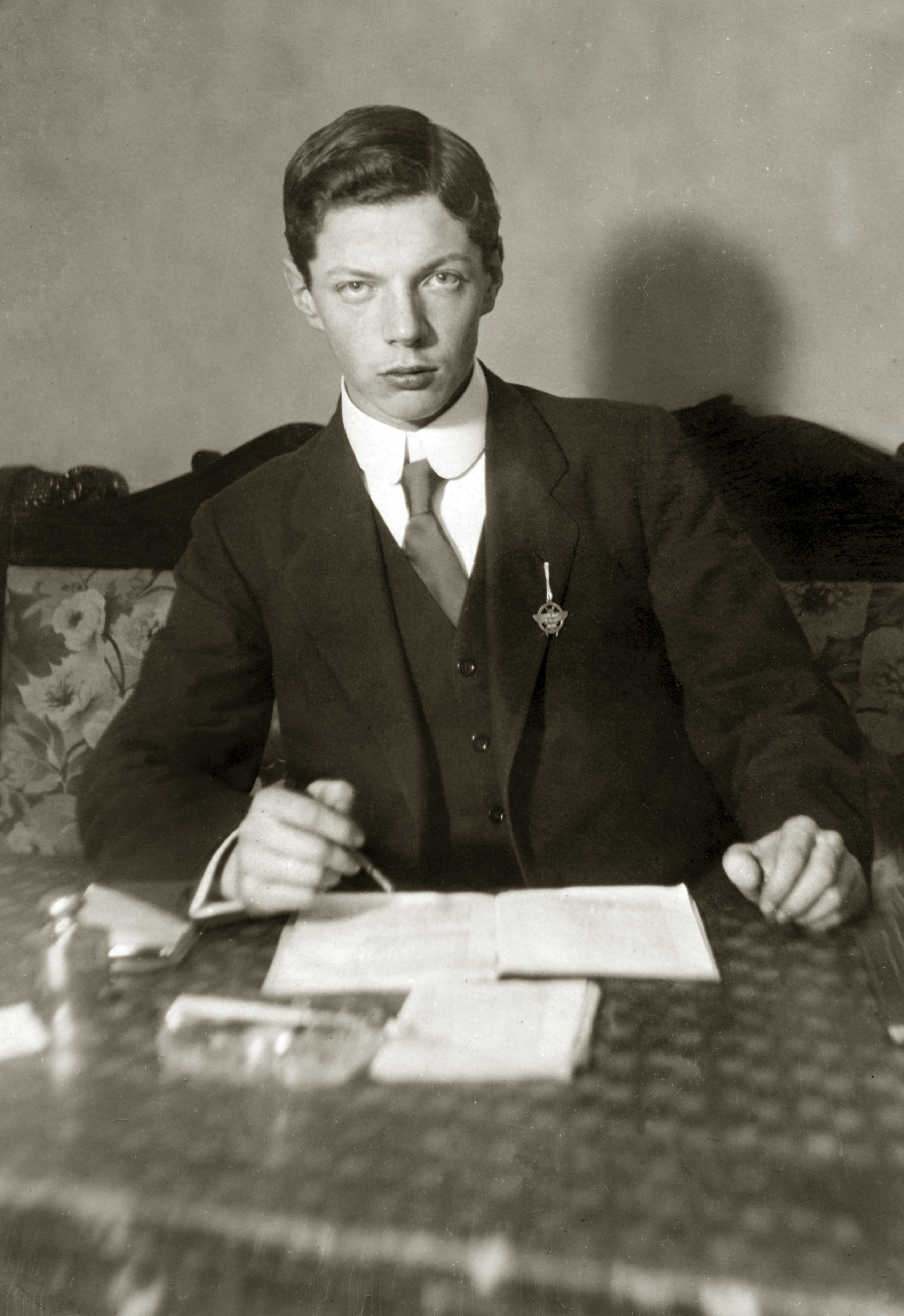 Ученик частной гимназии Карла Мая в Петербурге Павел Депп